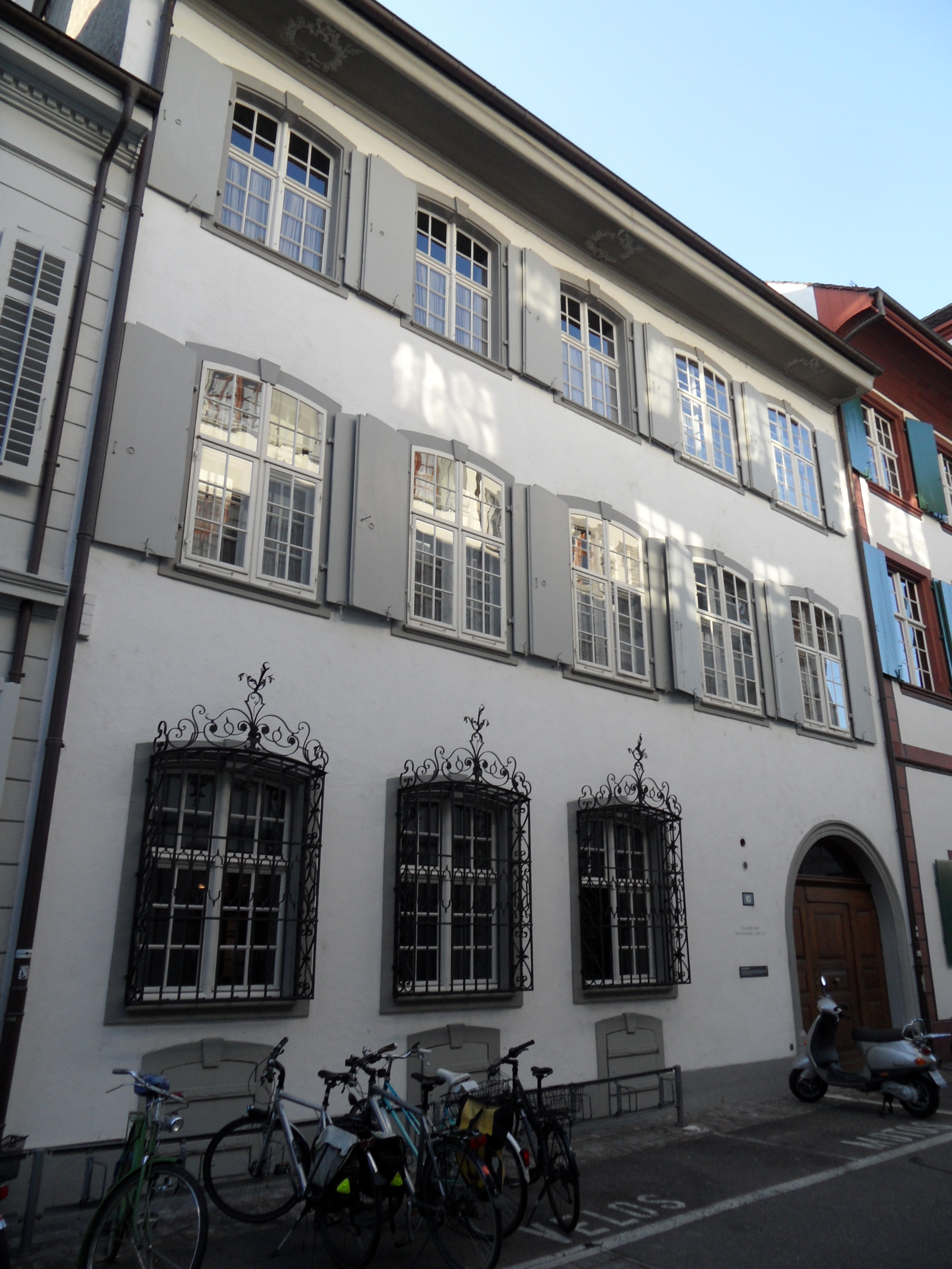 Zerkindenhof 2